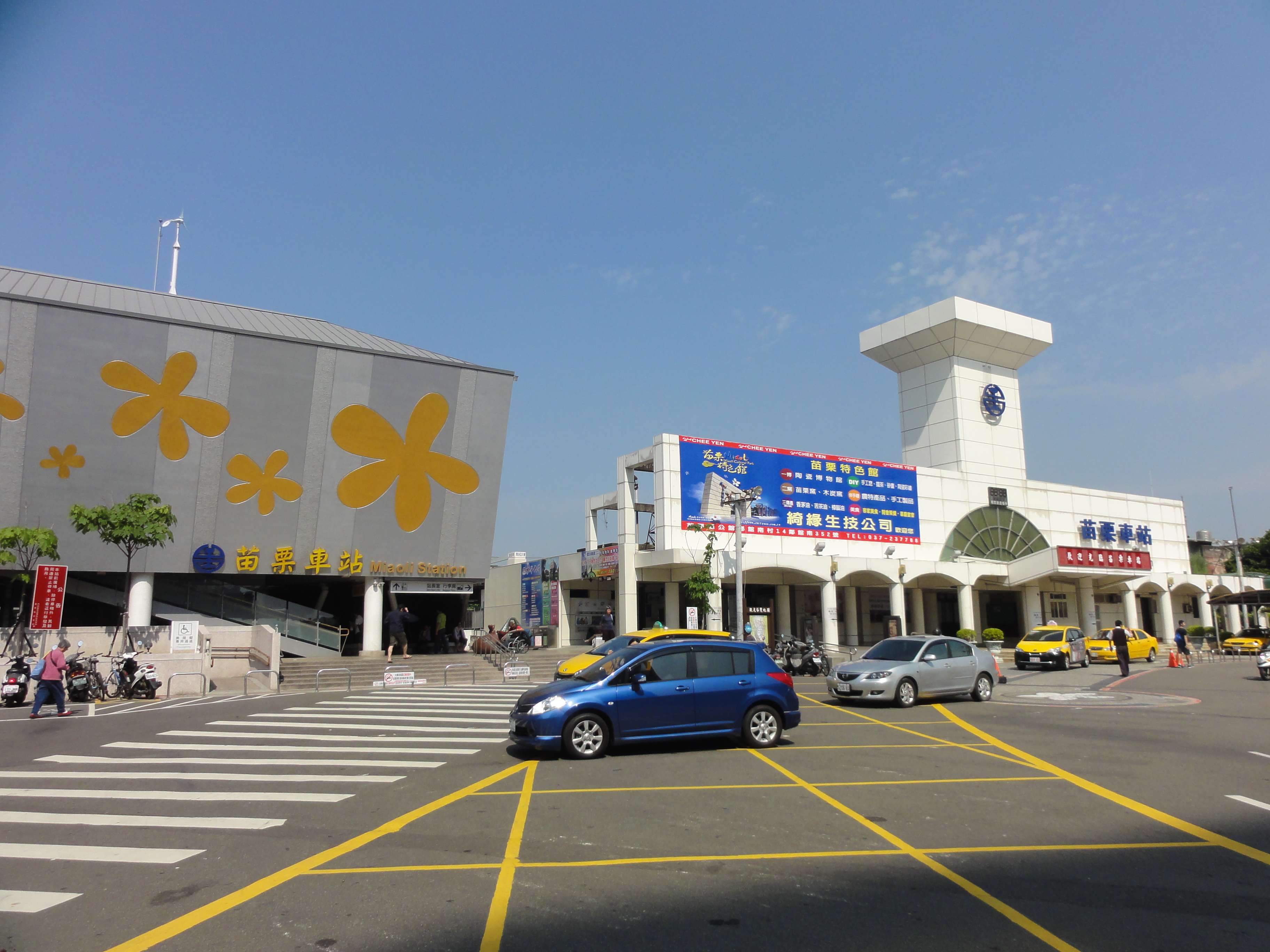 台鉄・苗栗駅 新旧 東口